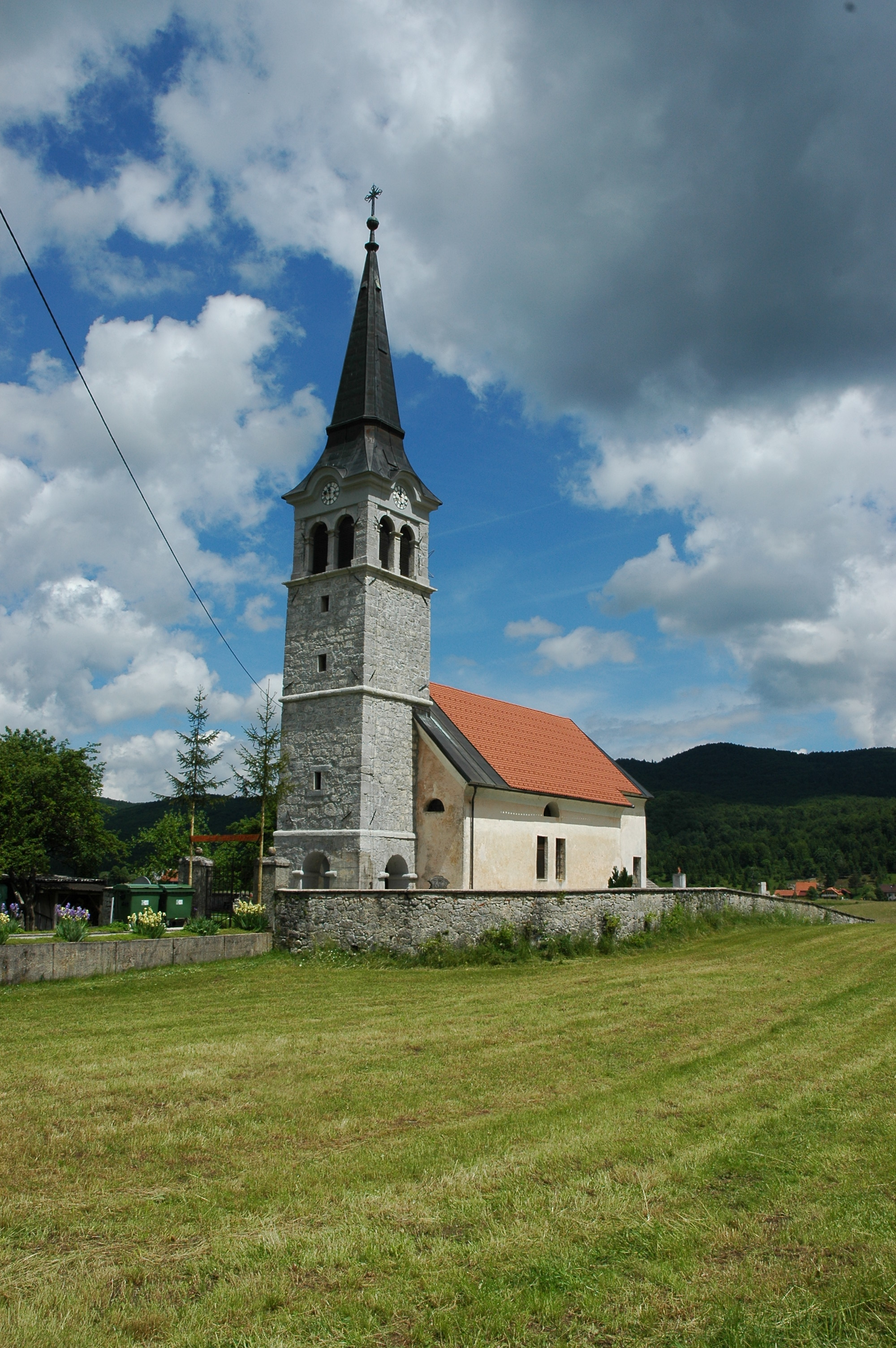 Foto: Alenka Veber, Župnijska cerkev sv. Nikolaja